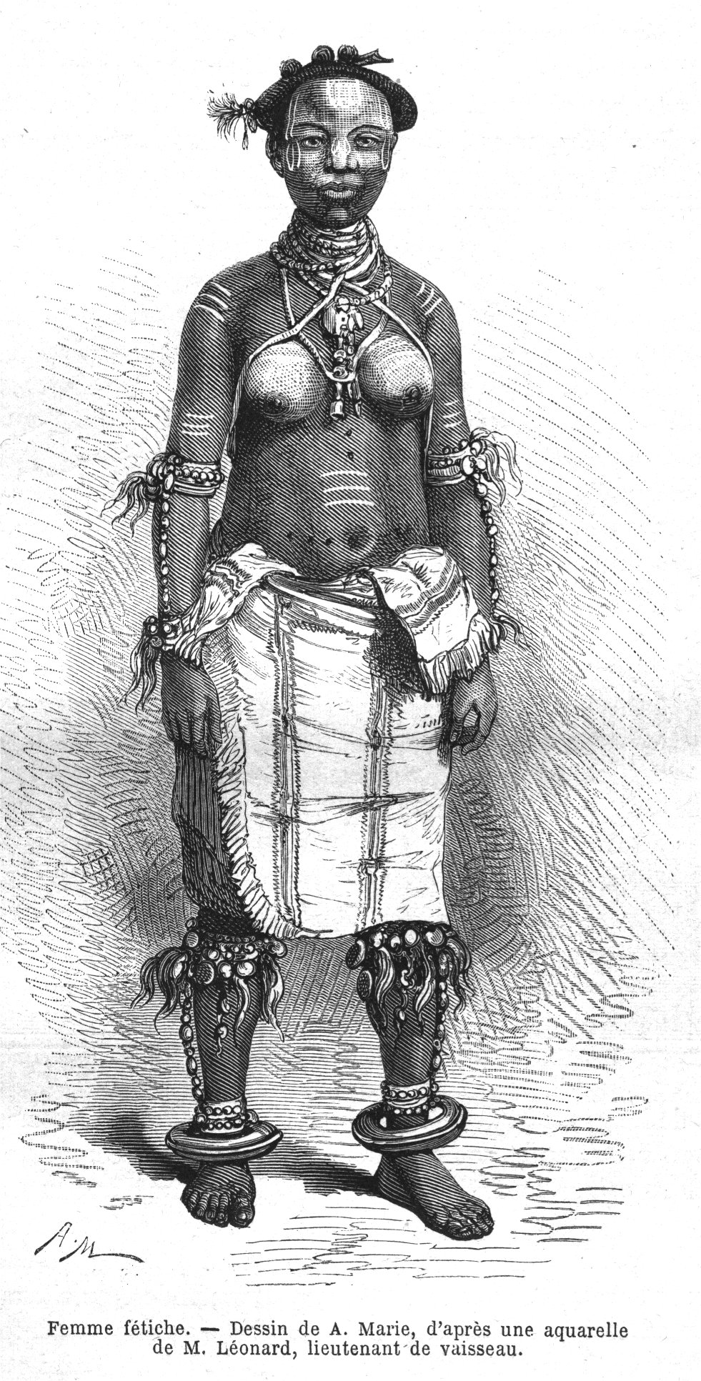 Fêmme fetiche des Croumanes